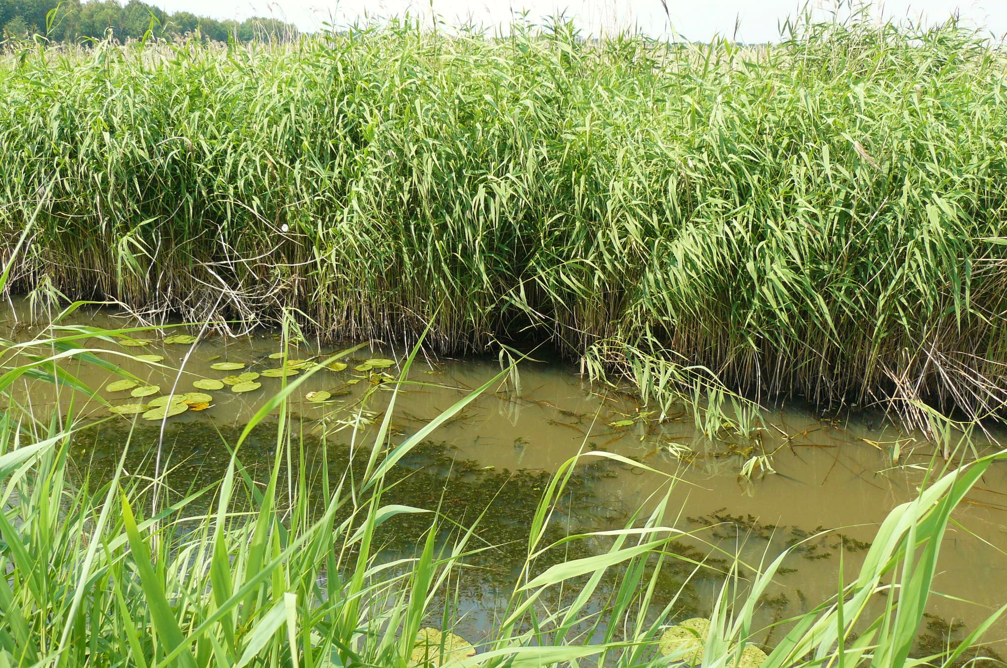 Stawy Milickie, kompleks Stawno, stawy w rejonie Grabownicy (Górny Staw i Golica).